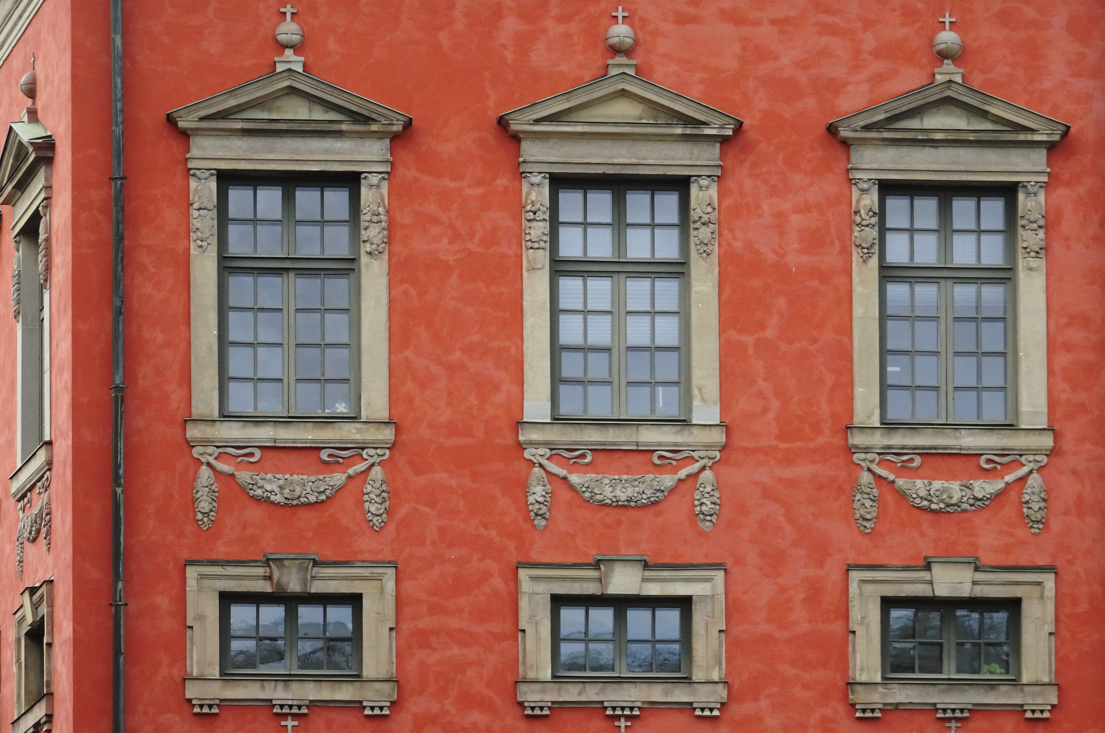 Axel Oxenstiernska palatset mot Högvaktsterrassen, fasadetalj